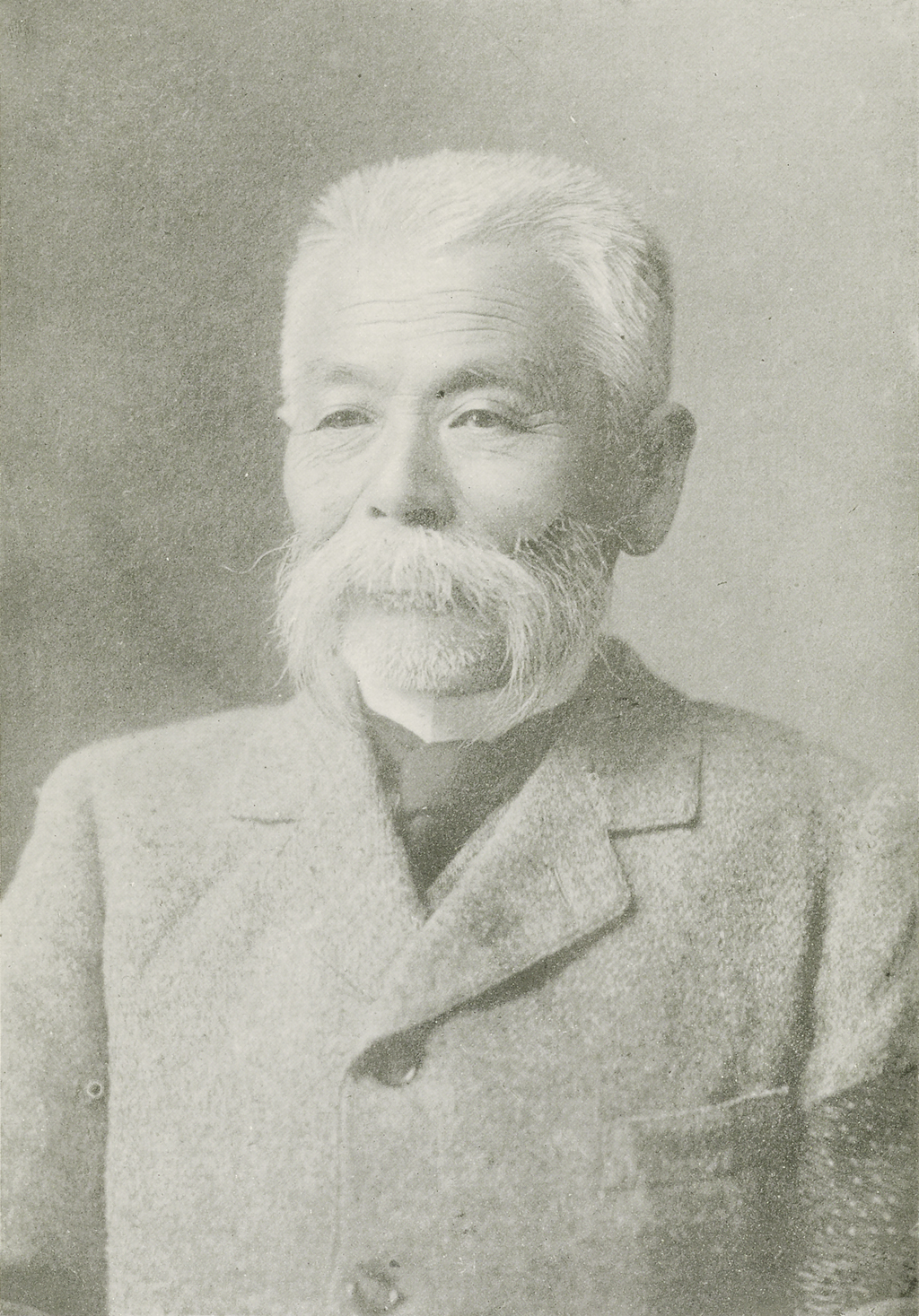 Portrait of Maeda Masana (前田正名, 1850 – 1921)